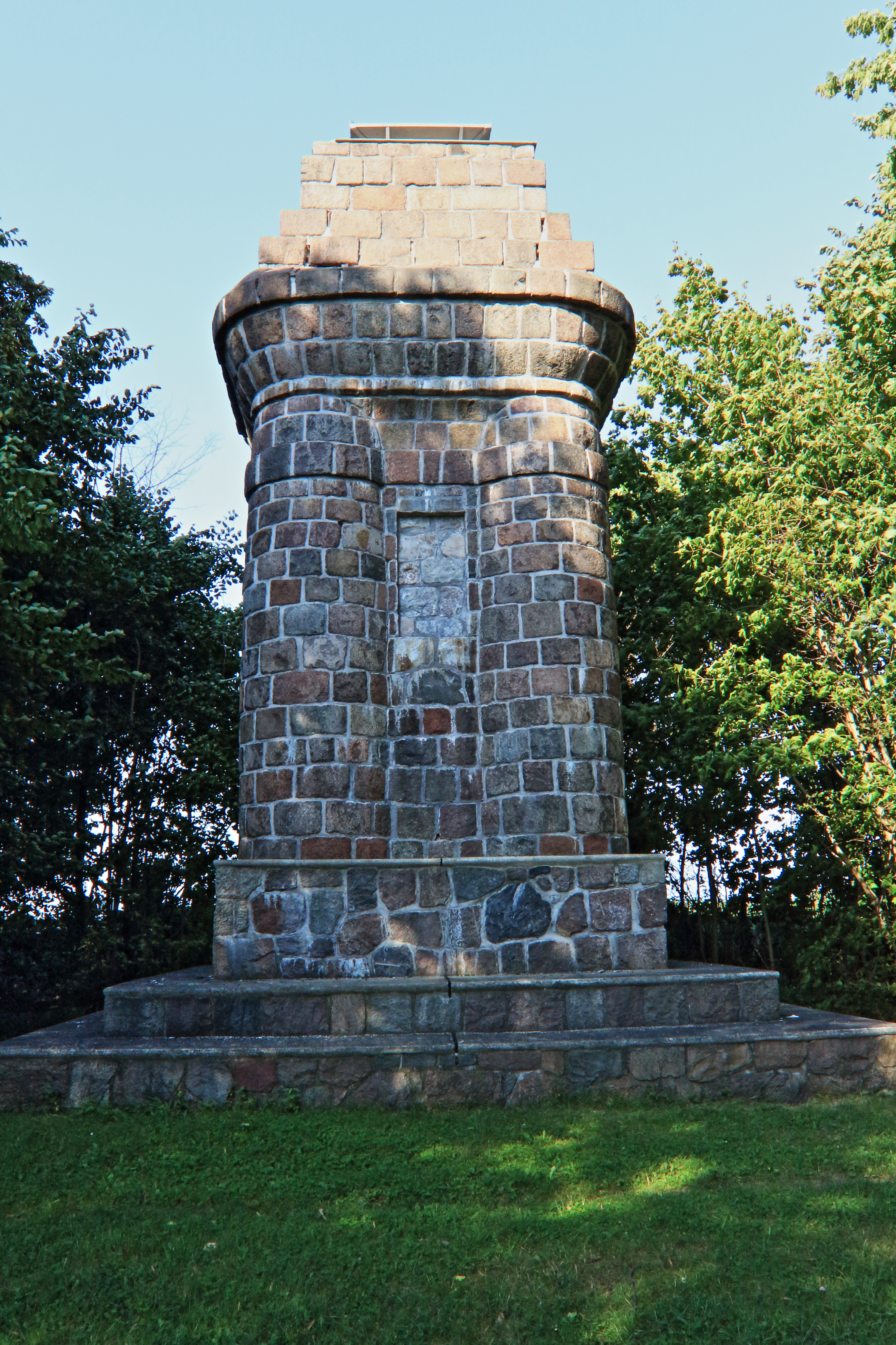 Bismarksäule auf dem Epistelberg in Greifswald